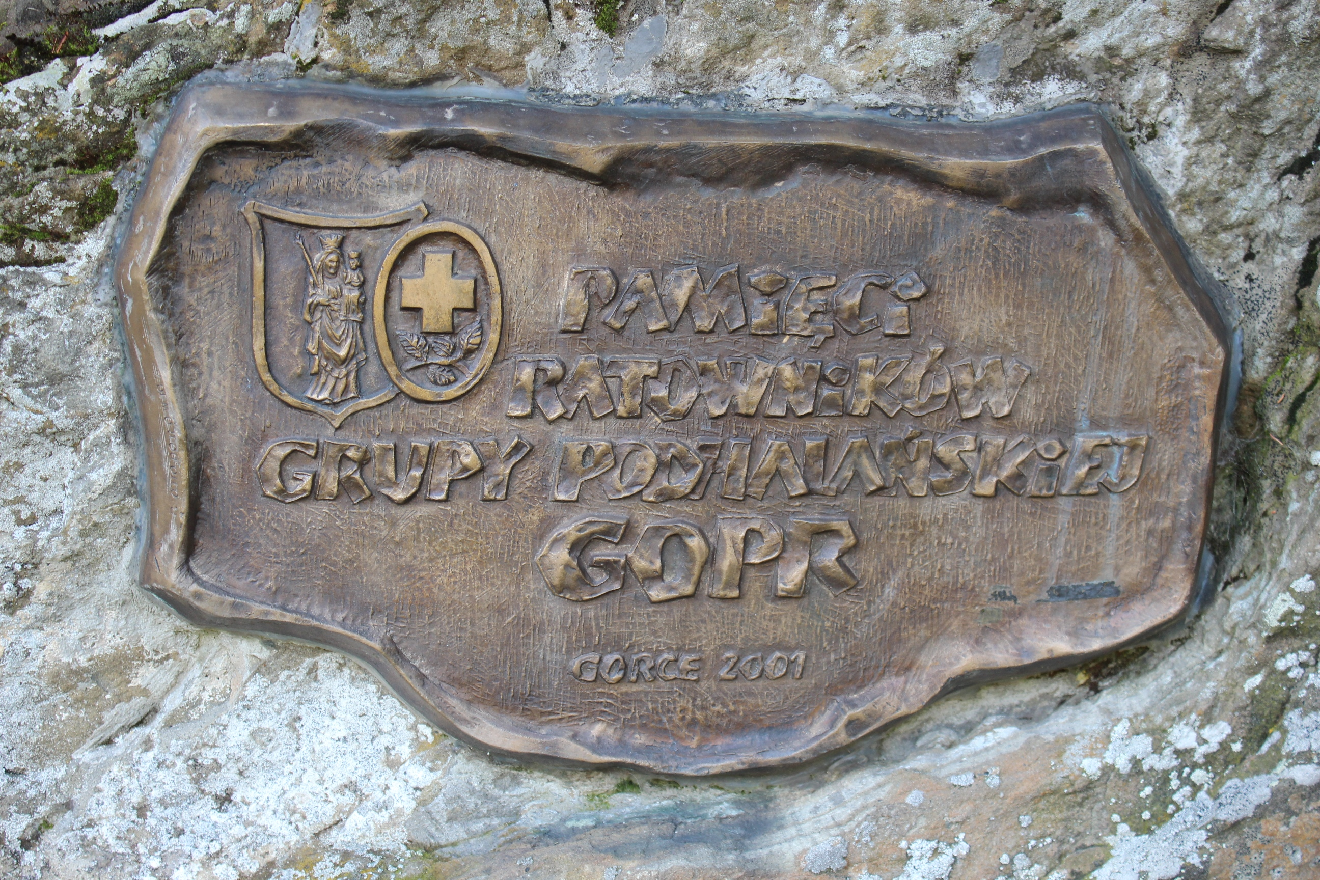 Diabelski Kamień - tablica GOPR